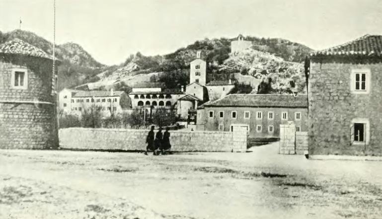 Monasterio y palacio real de Cetinje, capital del Reino de Montenegro, hacia 1904.